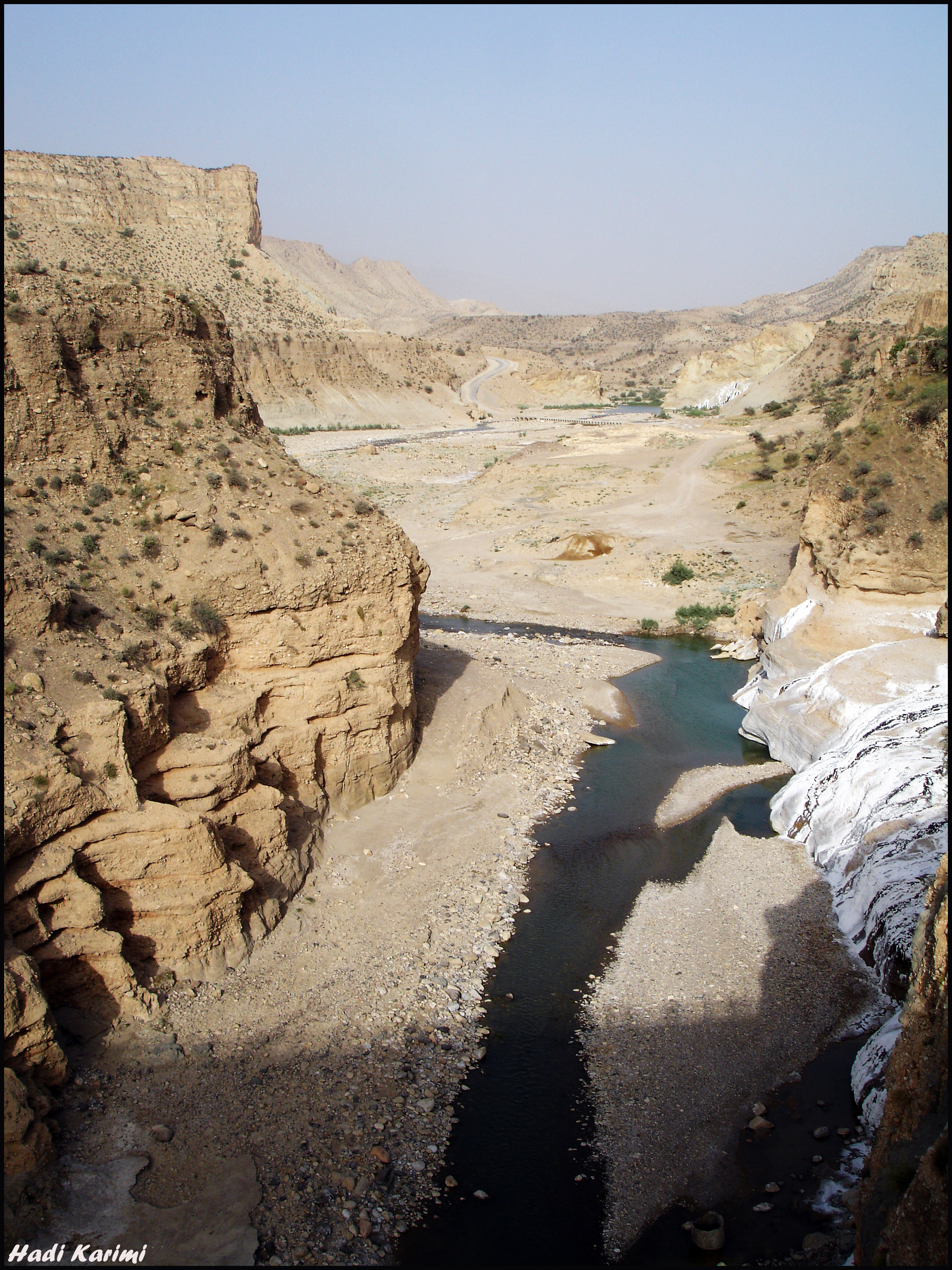 Firuzabad River رودخانه فیروزآباد